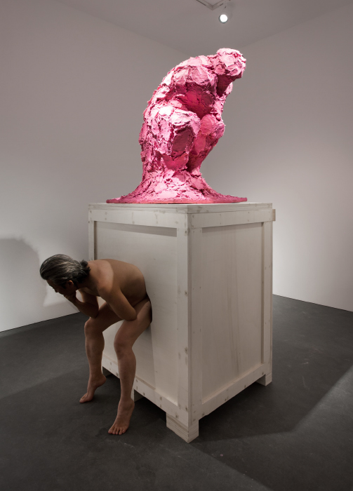 Cody Choi. The Thinker, 1995-96. Mixed Media (toilet paper, Pepto-Bismol, wood, plaster), 112 x 91.5(w) x 282(h) cm. Courtesy of the artist & PKM Gallery